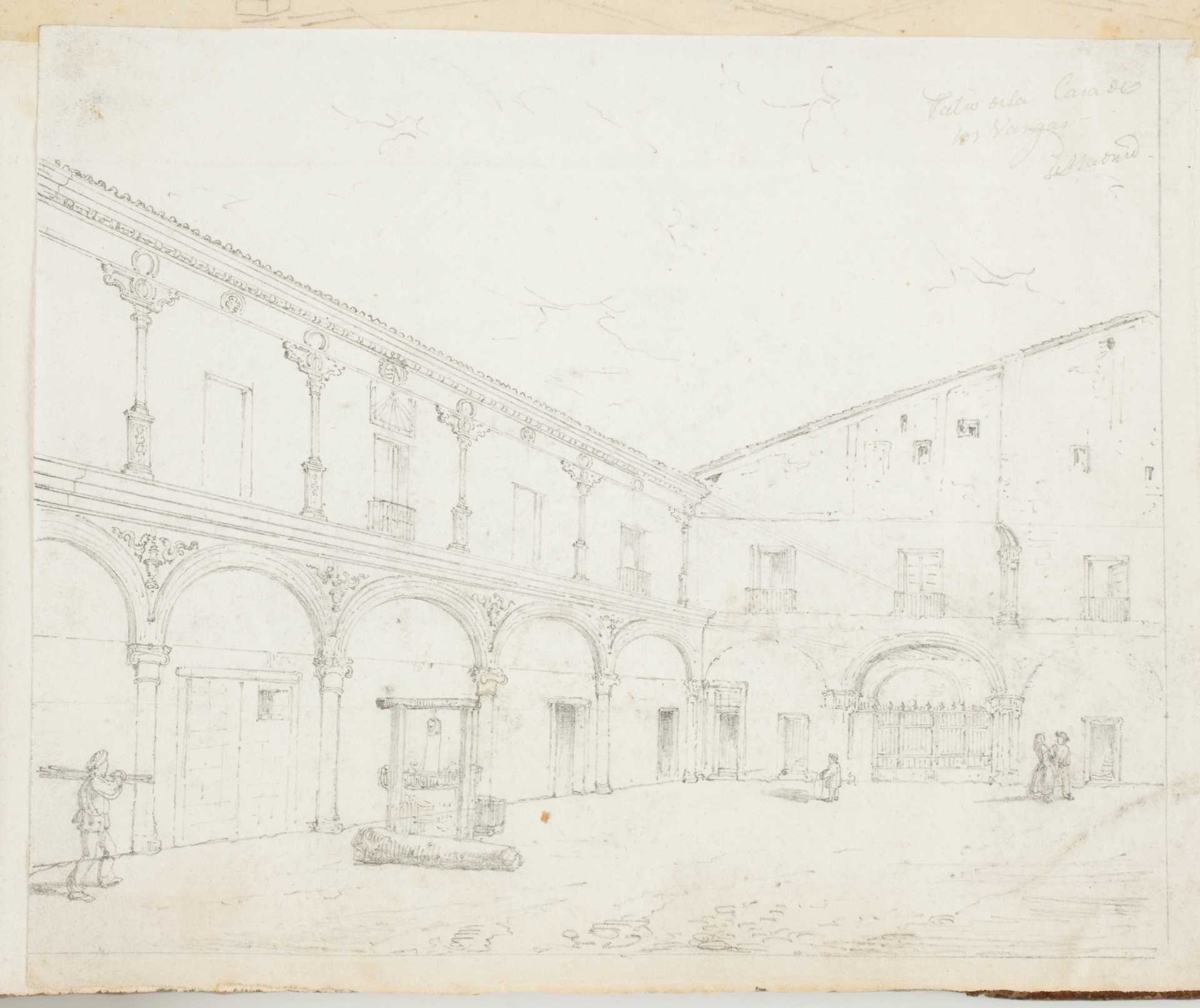 Patio de la Casa de los Vargas en Madrid (1840-1873). Lápiz compuesto sobre papel avitelado. Museo del Prado, Madrid, España